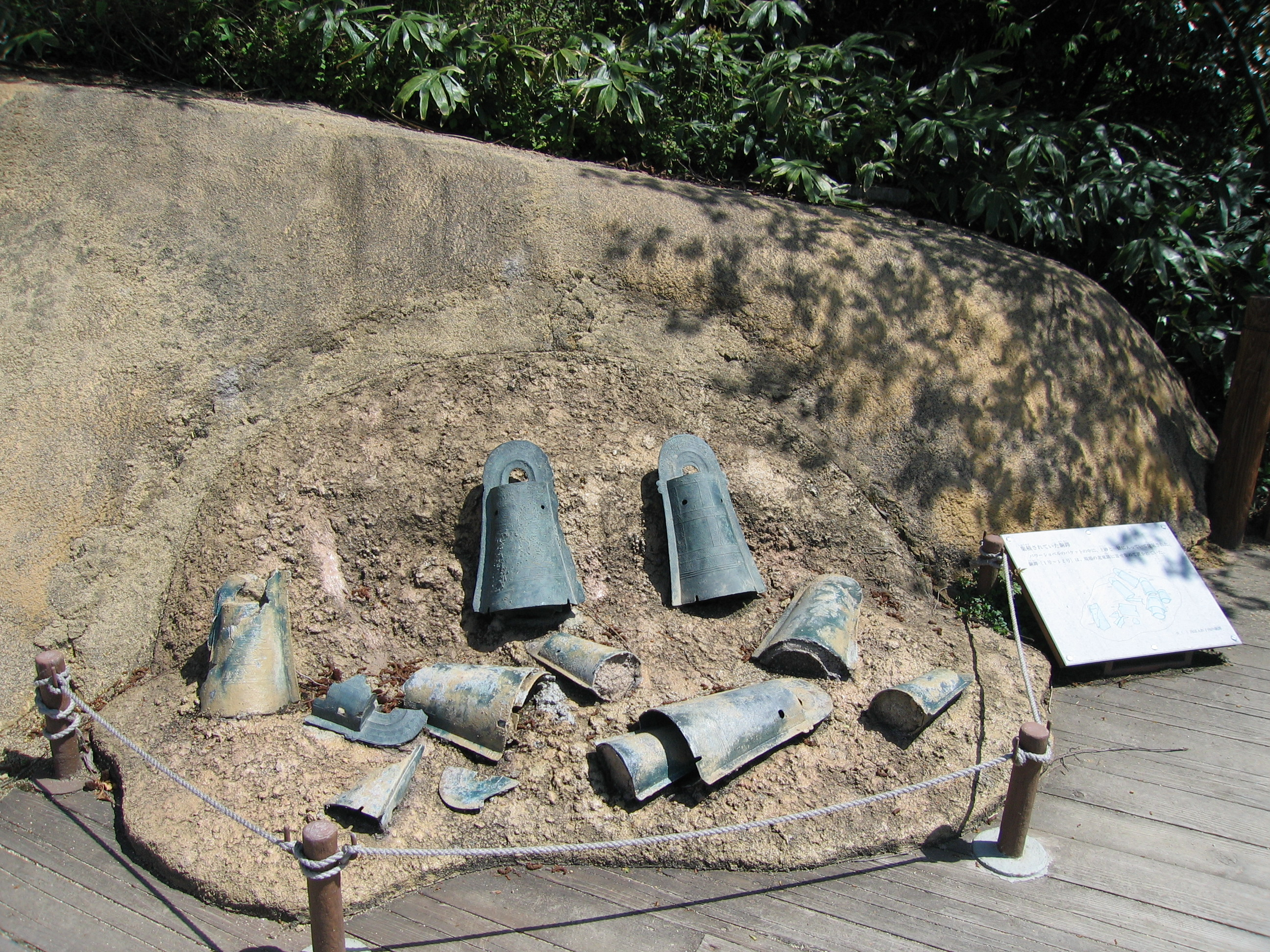 Kamoiwakura Ruins